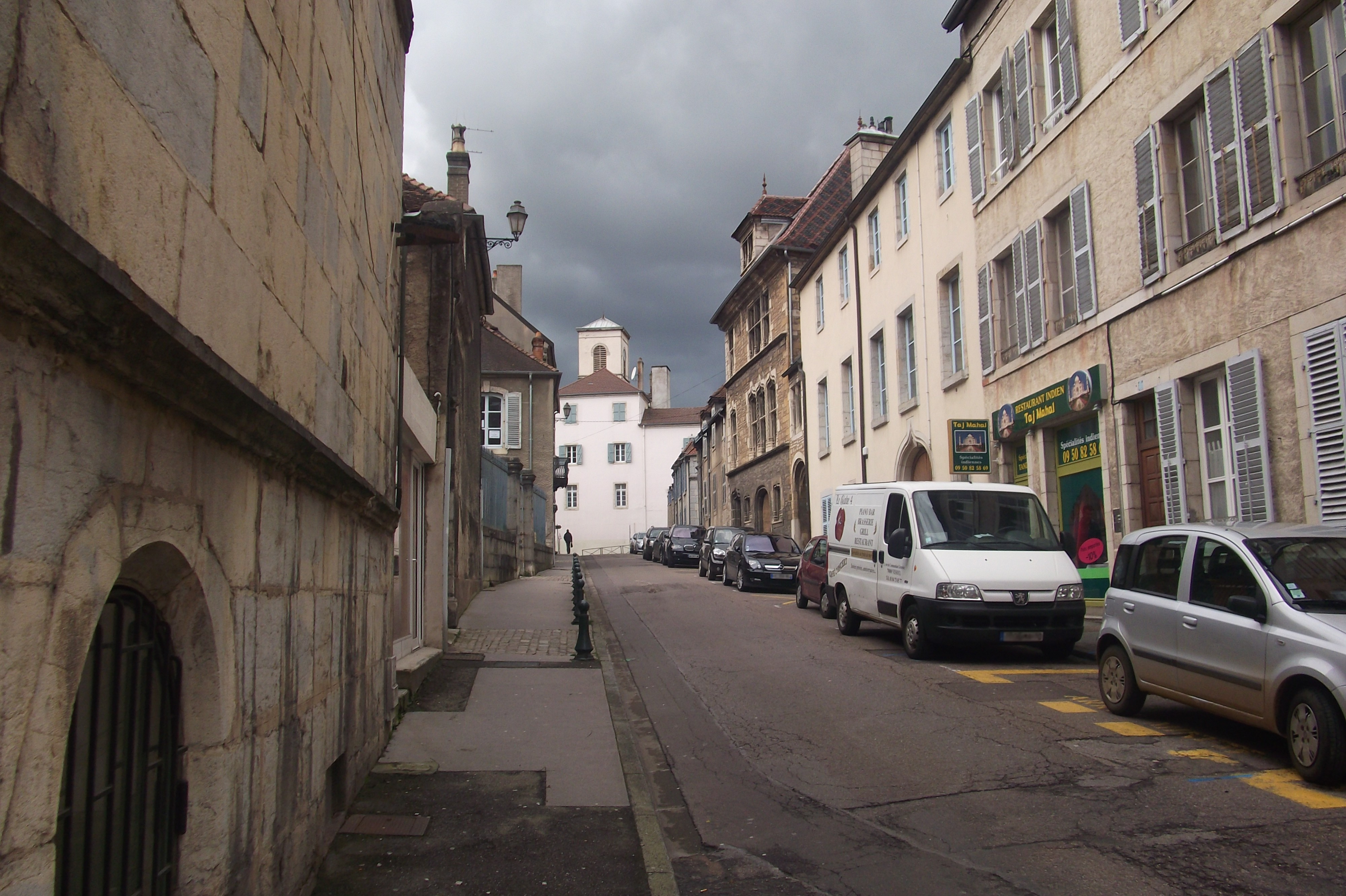 La rue Roger Salengro dans le centre-ville de Vesoul (Haute-Saône, Franche-Comté)